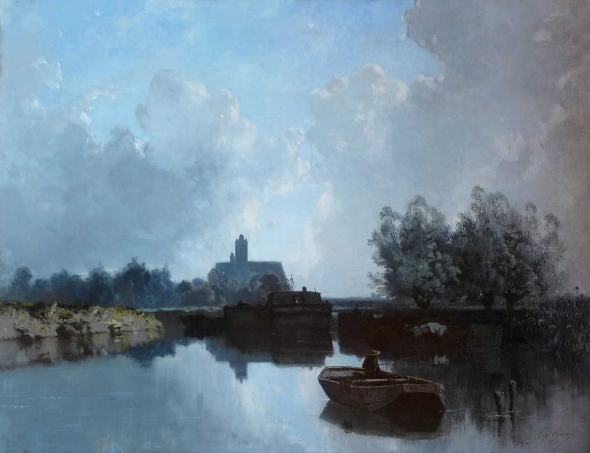 Eugène Cicéri, Au bord du Loing, 1866, Musée barrois (Bar-le-Duc)